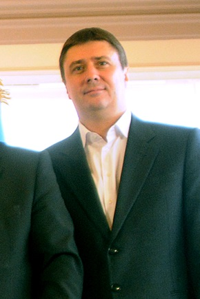 Вячеслав Кириленко, политический и государственный деятель Украины